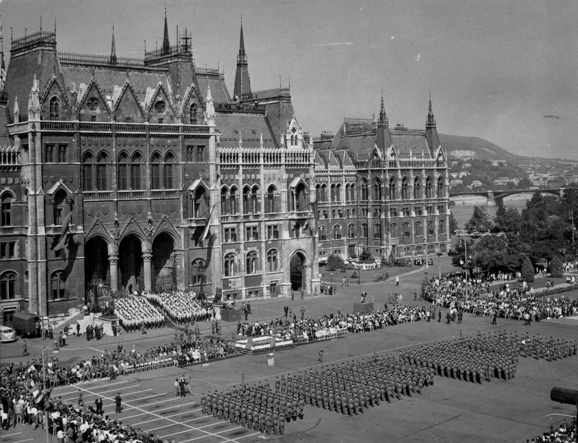 Kossuth Lajos tér, tisztavatás.Military officers 'inauguration'. Kossuth Square (Budapest) Location: Hungary, Budapest V. Tags: festive, military, Budapest Title: Kossuth Lajos tér, tisztavatás.